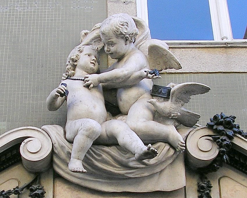 "Putti" at a shop façade in Porto, Portugal. Escultura de José de Oliveira Ferreira, intitulada "Grupo de Amores".